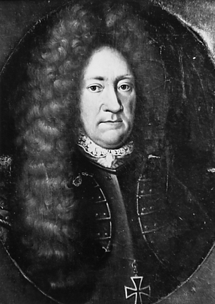 Graf Augustus zur Lippe-Brake (* Schloß Brake 9. September 1644; + Neuwied 19. Juni 1701), kurfürstlicher Hessischer Generalfeldmarschall, Komtur des Deutschen Ritterordens der Ballei Hessen. Begraben in der Marienkirche in Marburg, Denksteine dort und in der Kirche zu Brake (Lemgo).